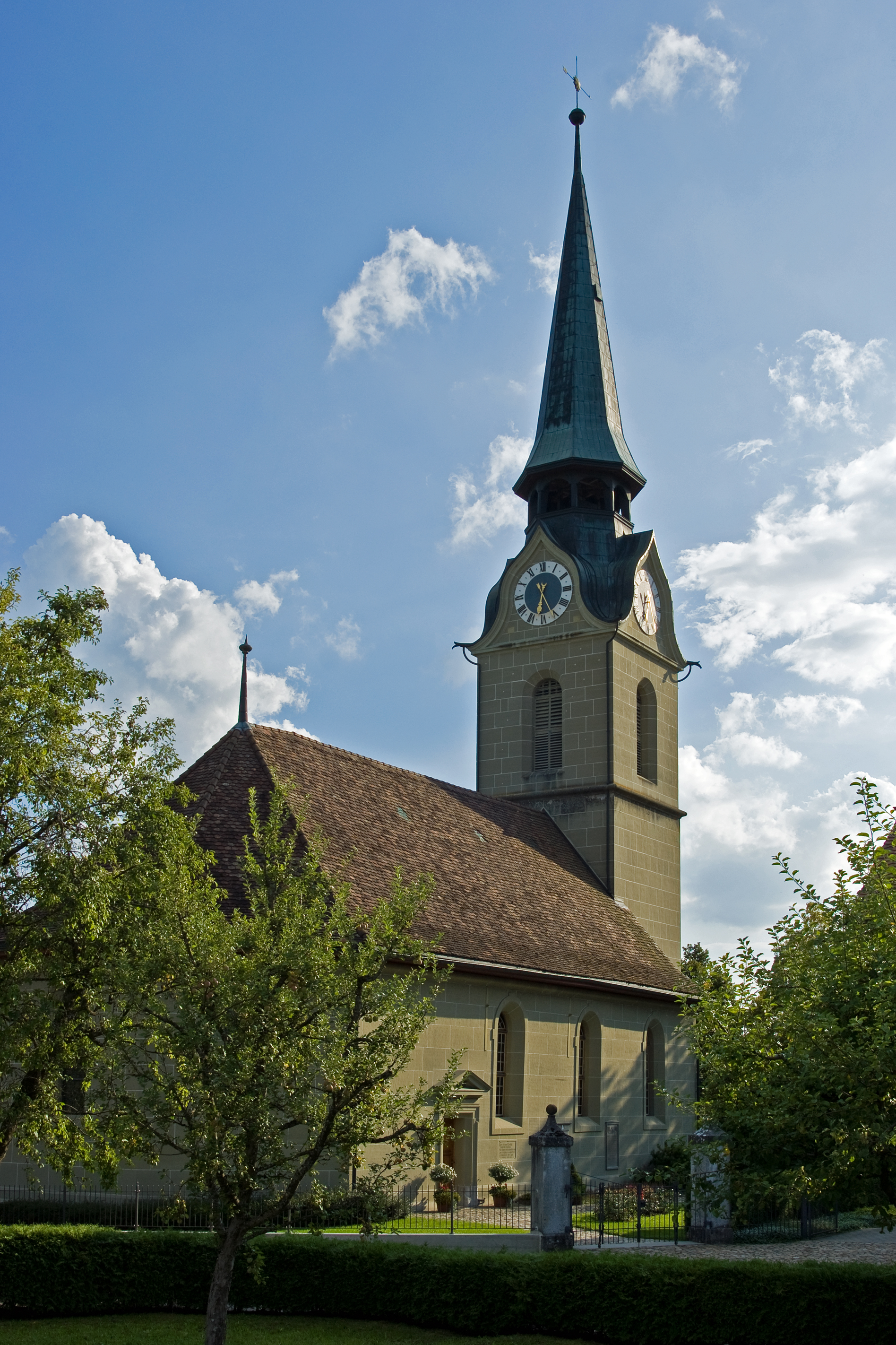 Reformierte Kirche in Heimiswil Kt. Bern, erbaut 1703